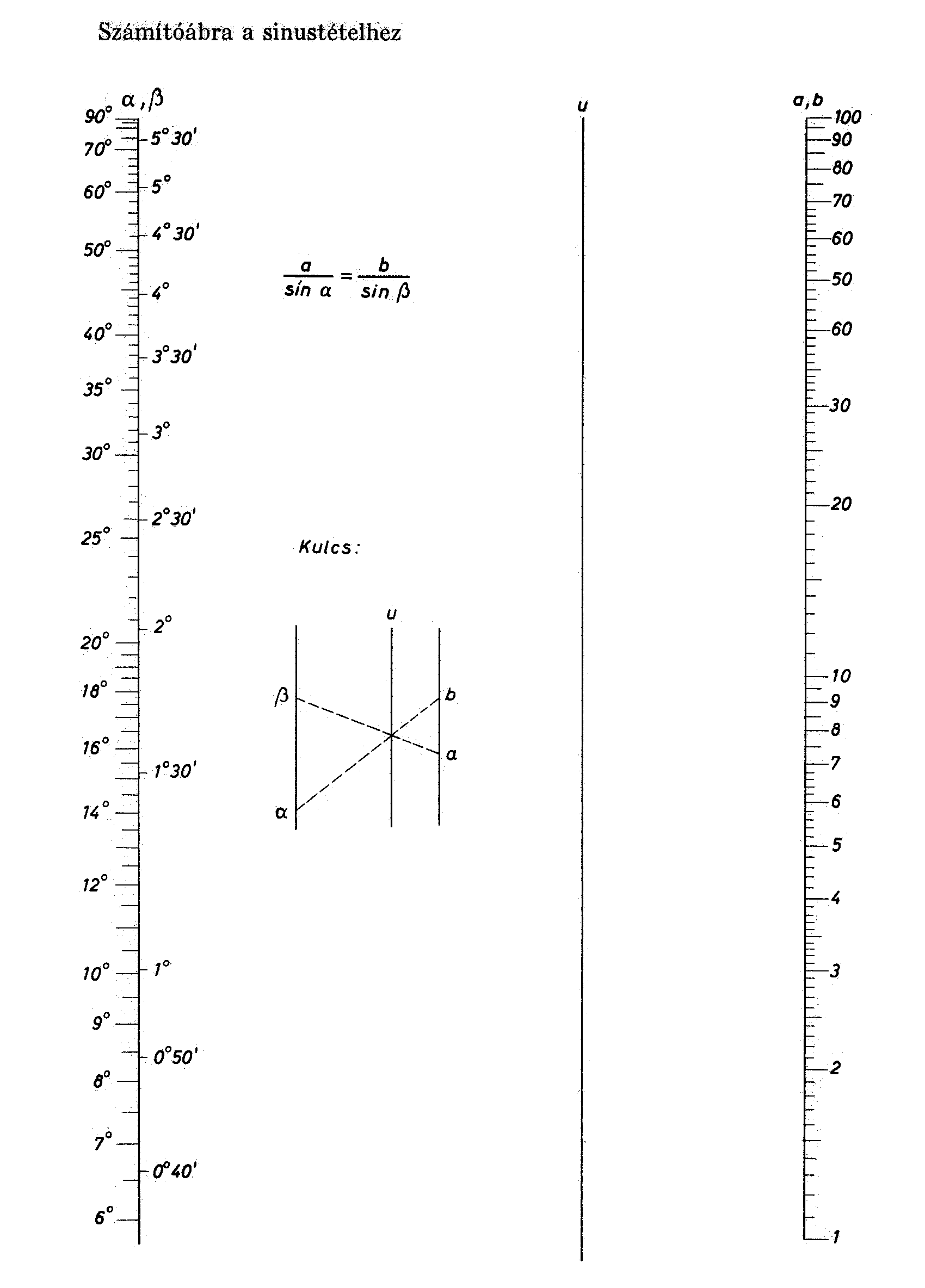 Számítóábra a szinusztételhez